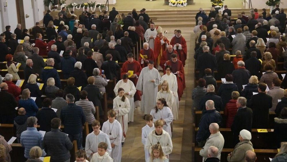 Nuntius Erzbischof Dr. Nikola Eterovic in Hof